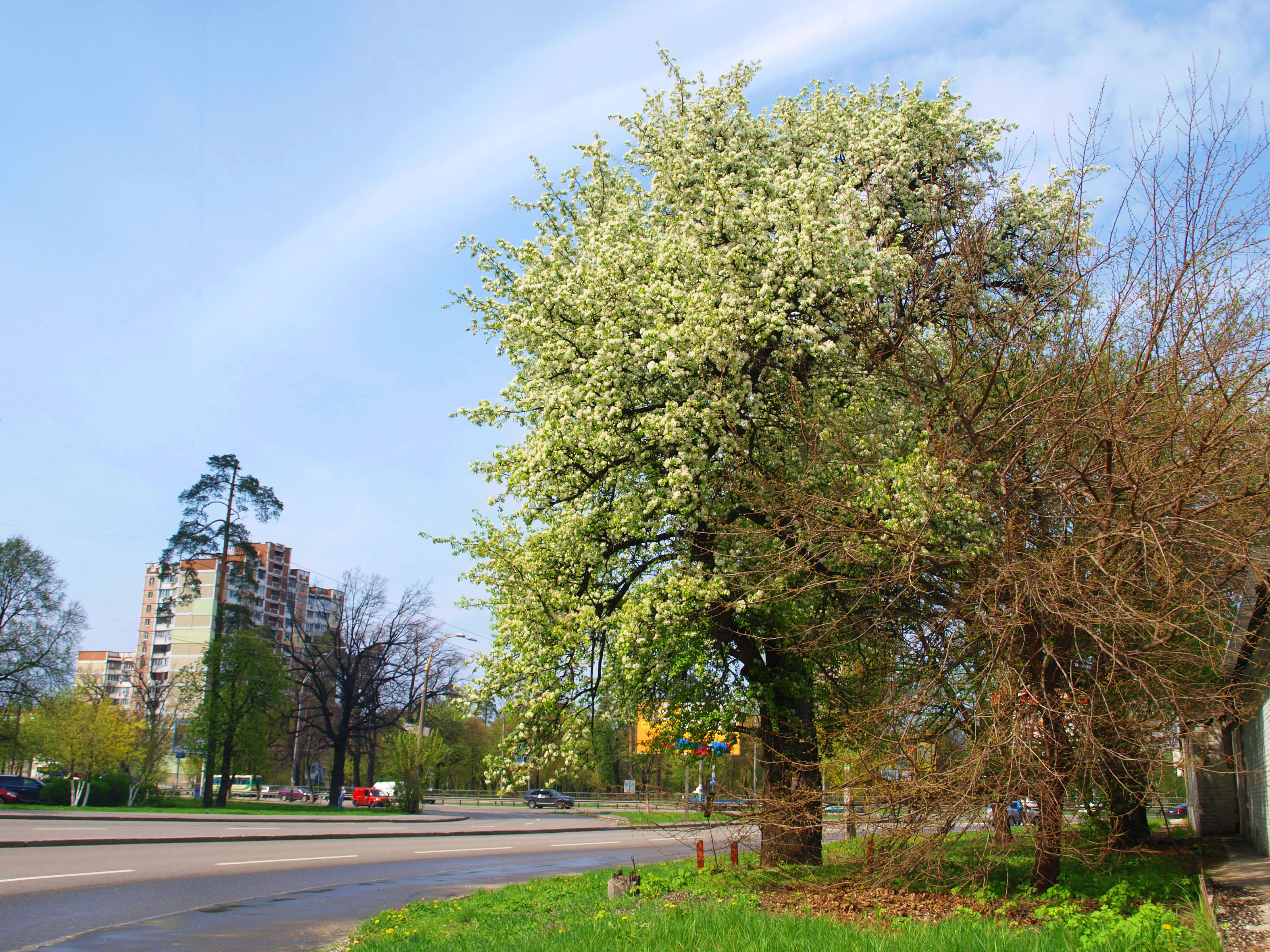 Груша звичайна. Пам'ятка природи. Біличі (Київ).